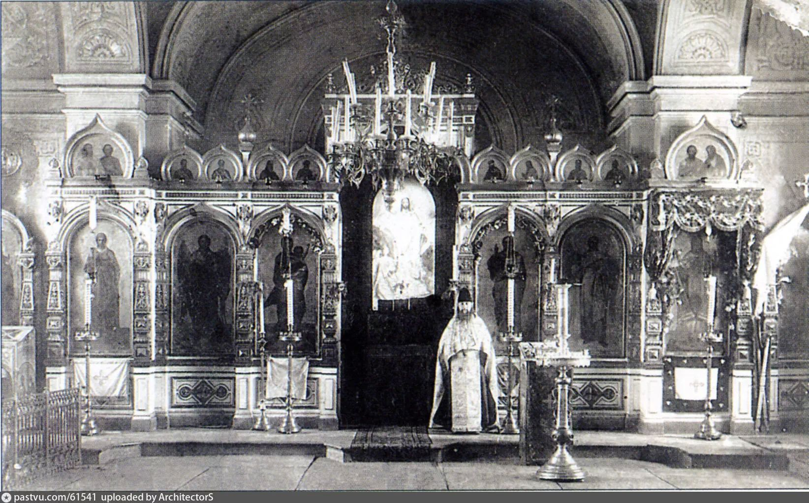 Москва. Интерьер храма св. Митрофания Воронежского. 1920